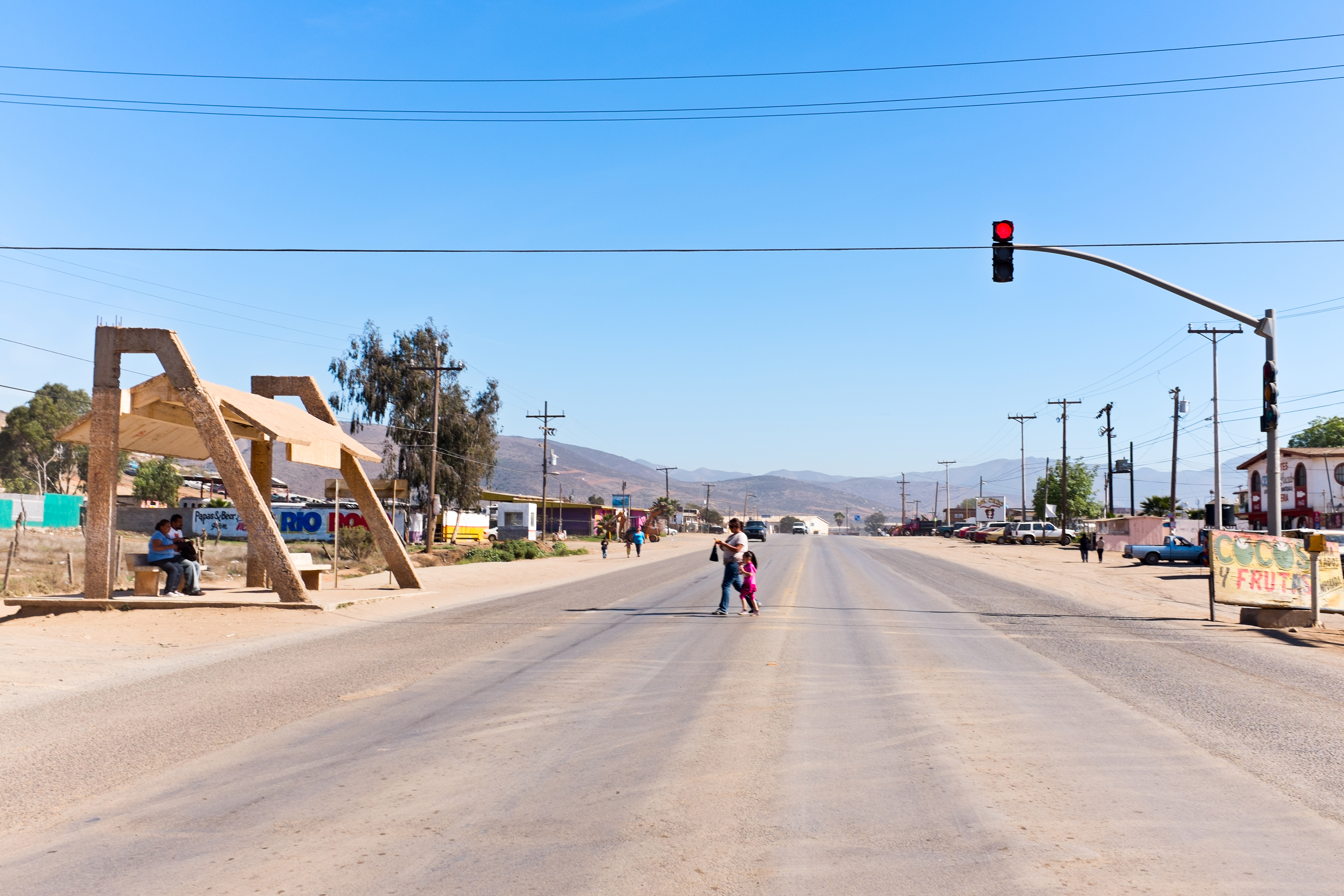 Vista de El Maneadero, Ensenada, Baja California, Mexico